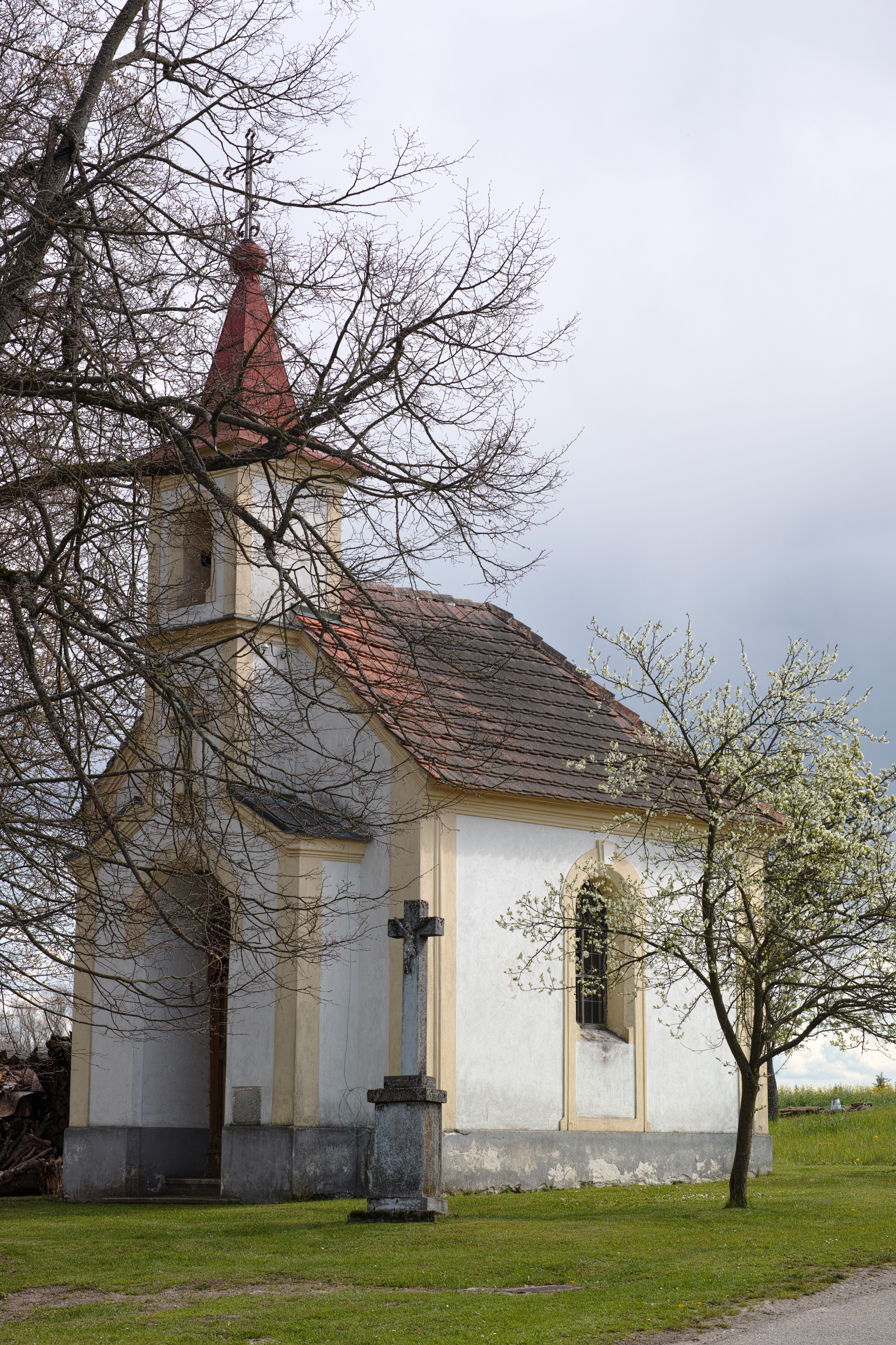 Červený Újezdec u Lišova, návesní kaple